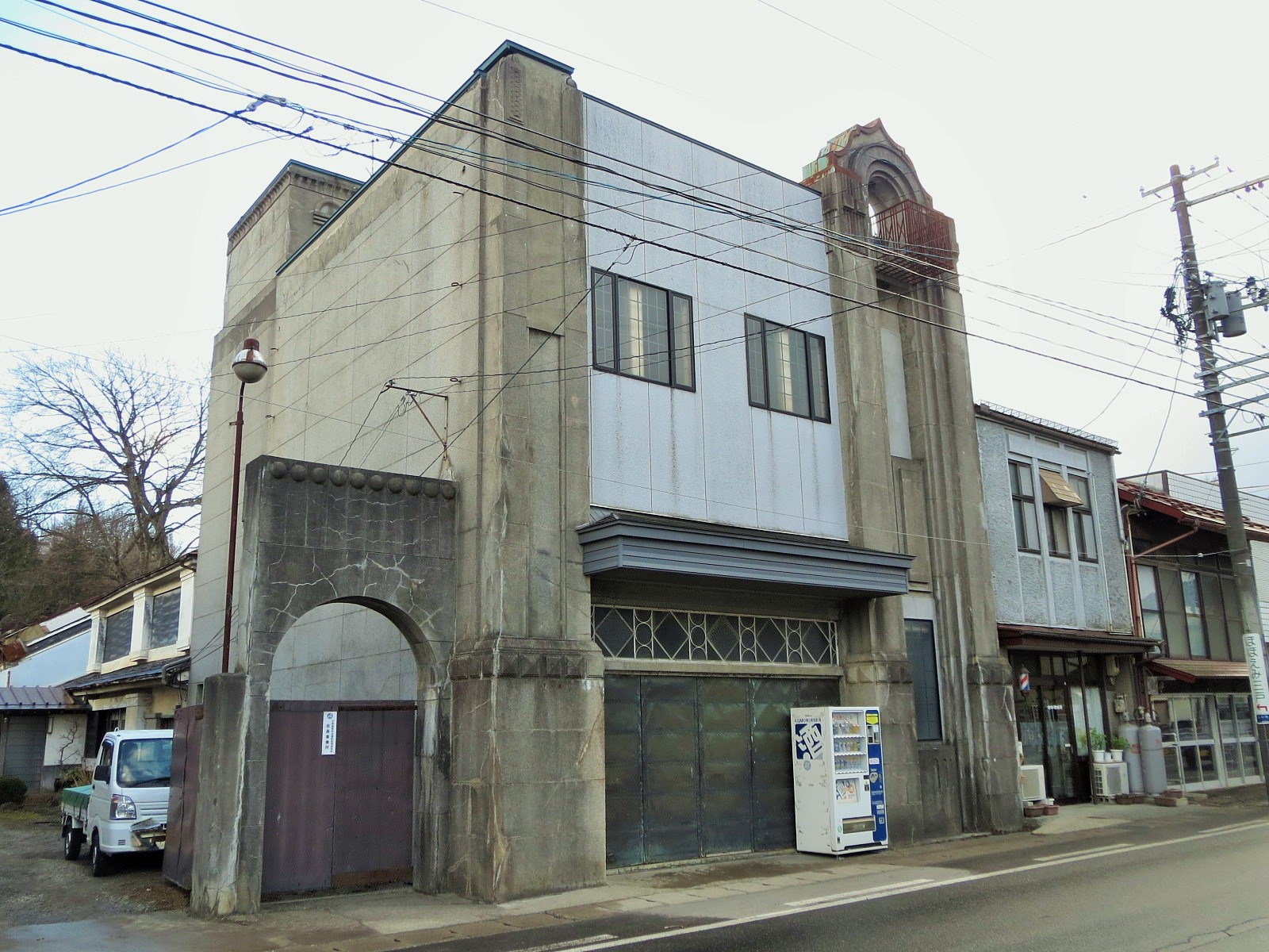 三戸市にある佐瀧本店 Canon IXY 3